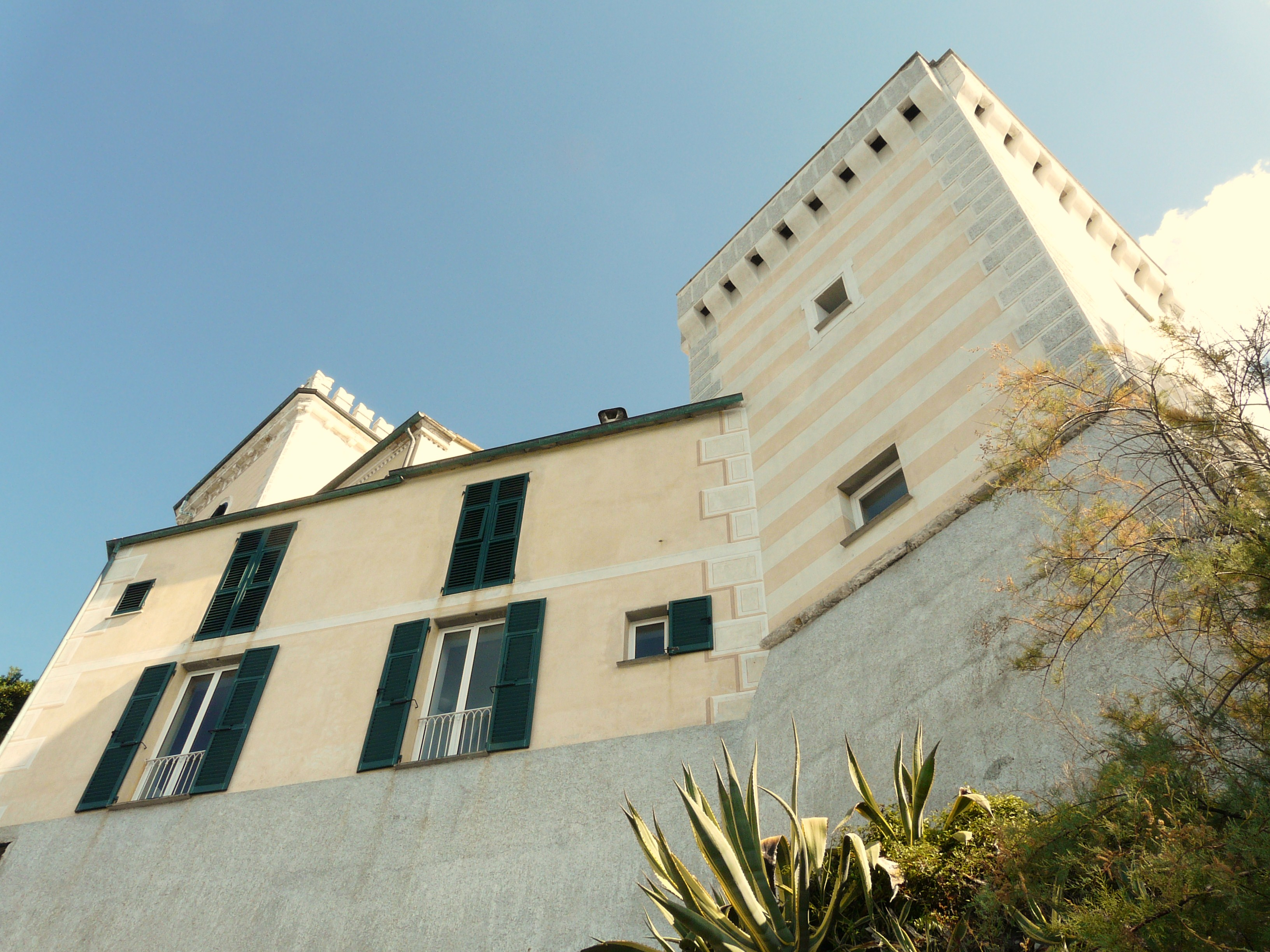 Il Castello Canevaro, Zoagli, Liguria, Italia